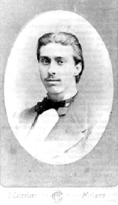 Retrato de Olallo Morales Lupión, diplomático y planificador de la línea de ferrocarril Almería-Linares (España). Padre del músico almeriense Olallo Morales Wilskman